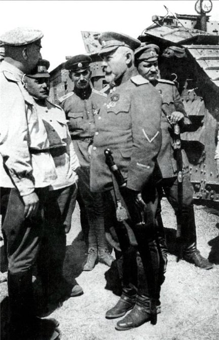 Главнокомандующий Вооружёнными силами Юга России генерал-лейтенант Антон Деникин в танковых частях своей армии, 1919 год